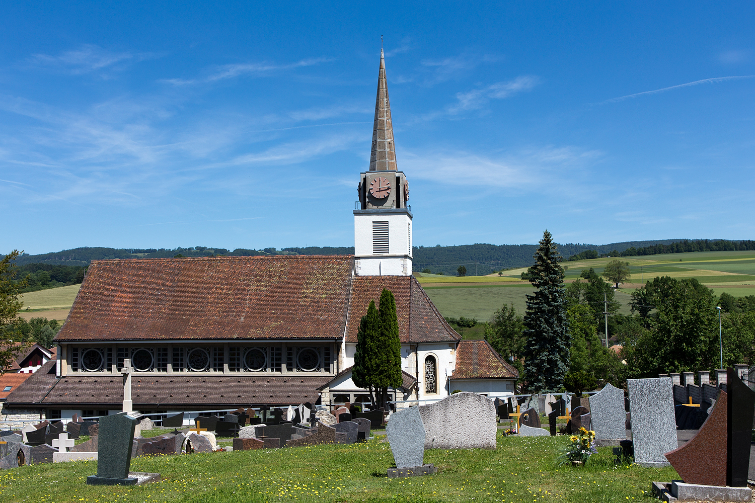 Kirche Saint-Germain d'Auxerre